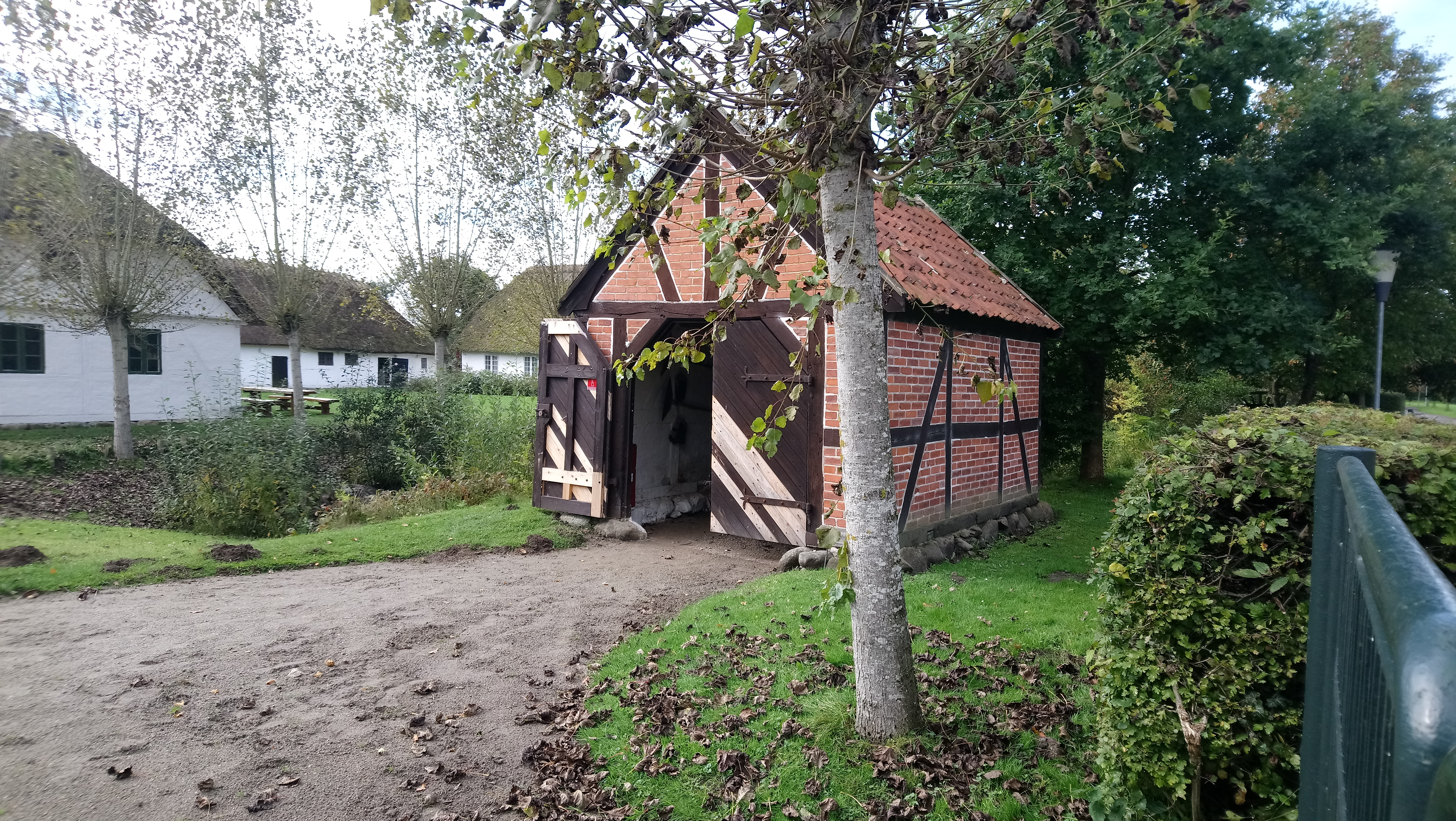 Kom til museet i 1937.